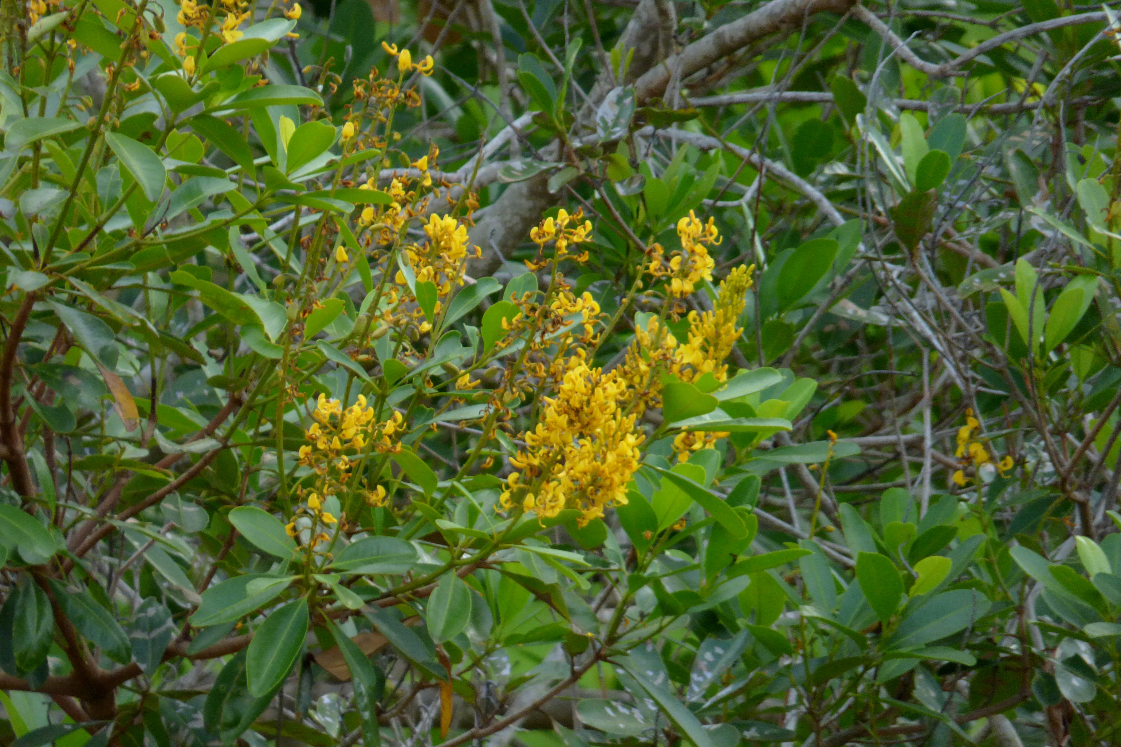 Primer plano de hojas y flores de Vochysia ferruginea en Colombia.